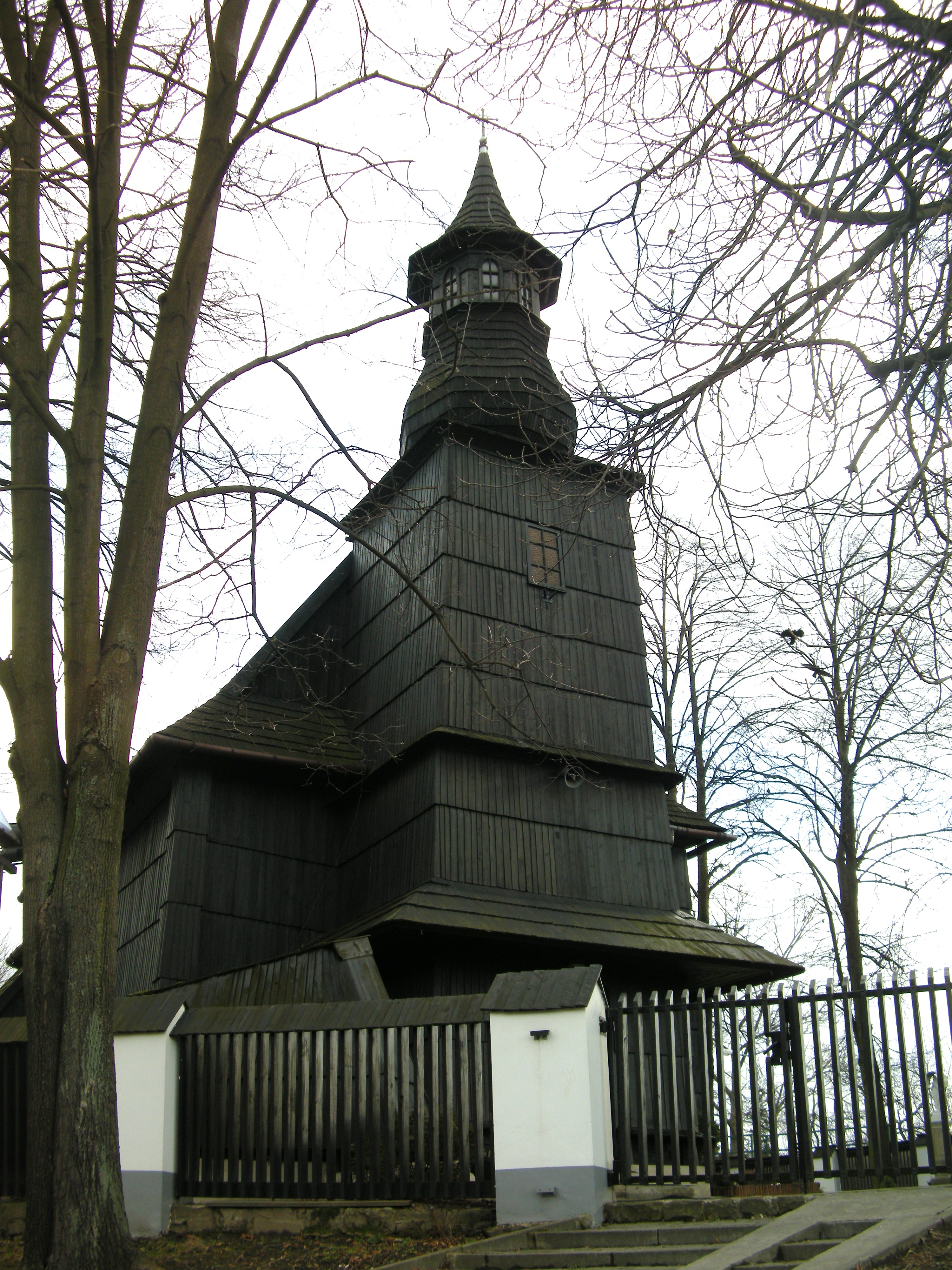 Kościół Trójcy Przenajświętszej w Tarnowie